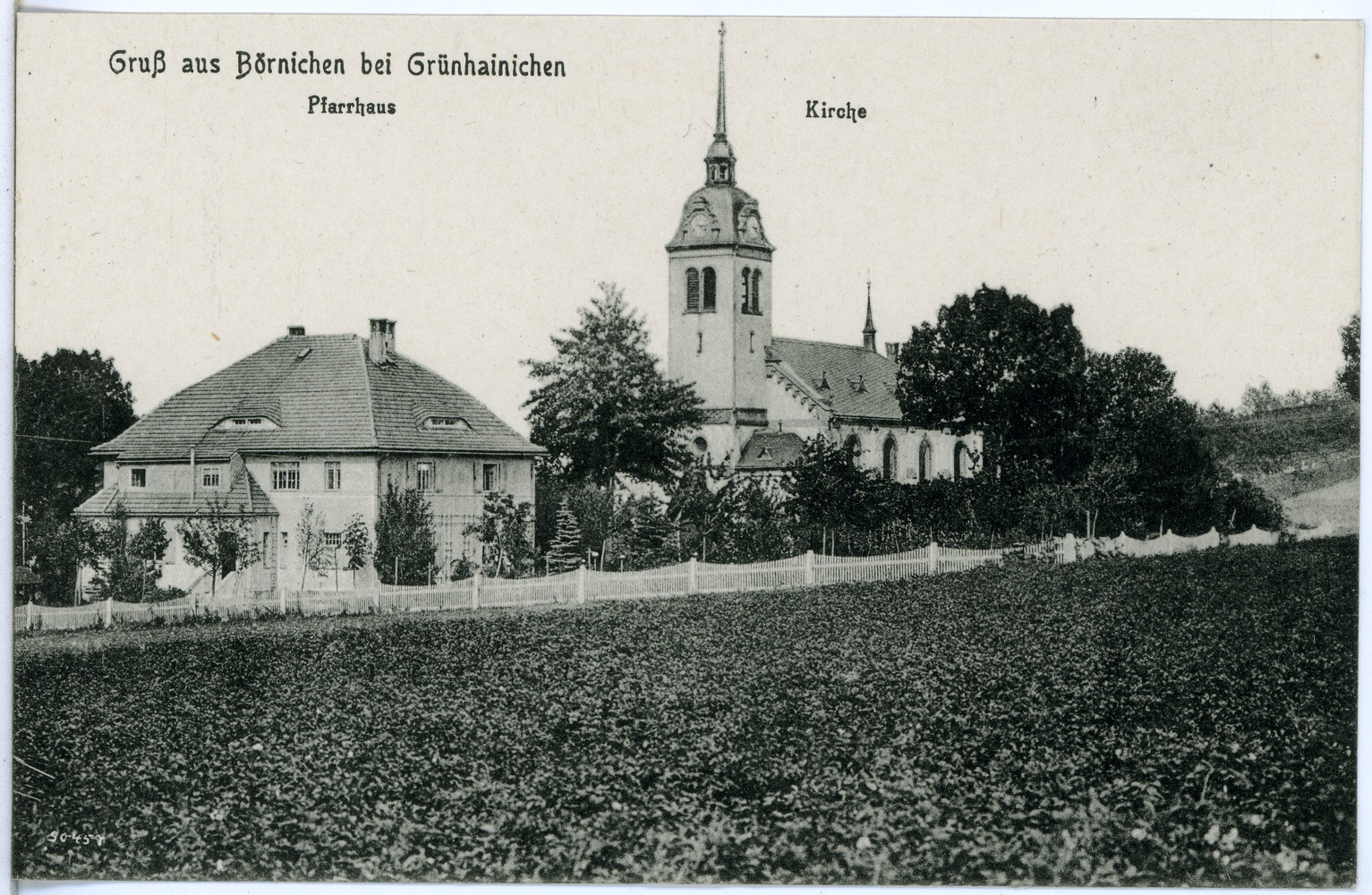 Börnichen; Kirche und Pfarrhaus This postcard is from publisher Brück & Sohn in Meißen ( postcard has a unique number 20606 and is available in a higher resolution at the publisher. This images was uploaded in a cooperation project between Wikipedians and the publisher.